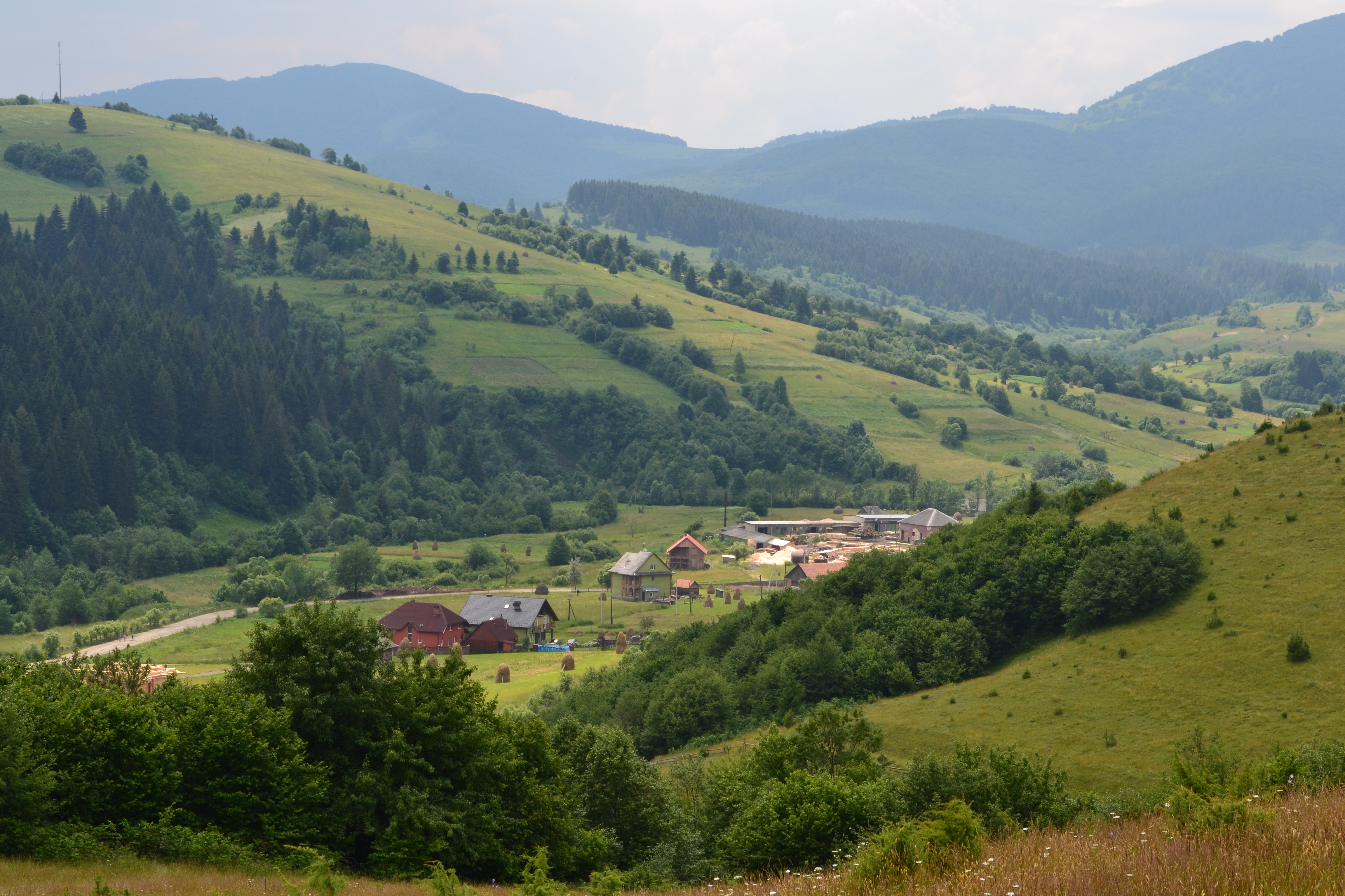 Полонина Боржава в районі Вілли Річка. Село Річка